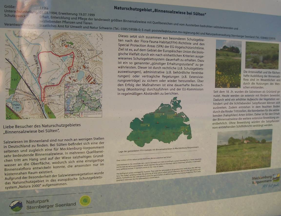 Historie und weitere Angaben zum Naturschutzgebiet Binnensalzwiese bei Sülten.